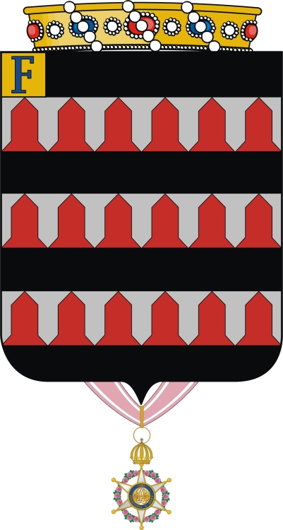 Pleno de Vasconcelos: de negro, com três faixas veiradas de prata e vermelho; diferença pessoal: brica de ouro carregada com a letra "J" de azul. Coroa de Barão. Medaha; comendador da Imperial Ordem da Rosa.